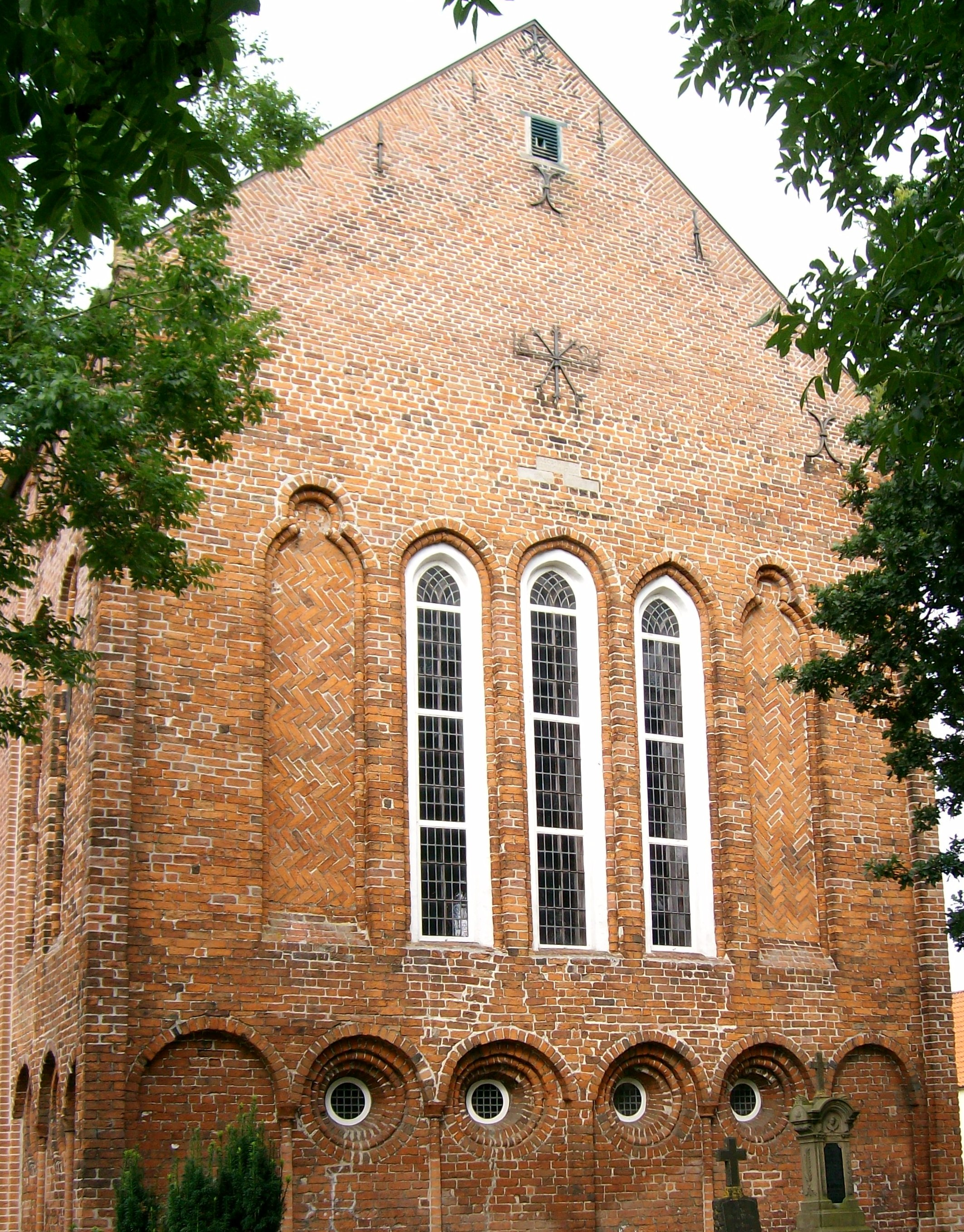 Reformierte Kirche Bunde, Osten, 13. Jahrhundert